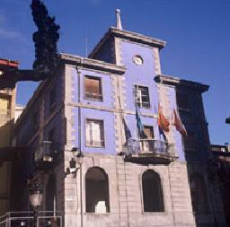 Ayuntamiento del concejo asturiano de Carreño